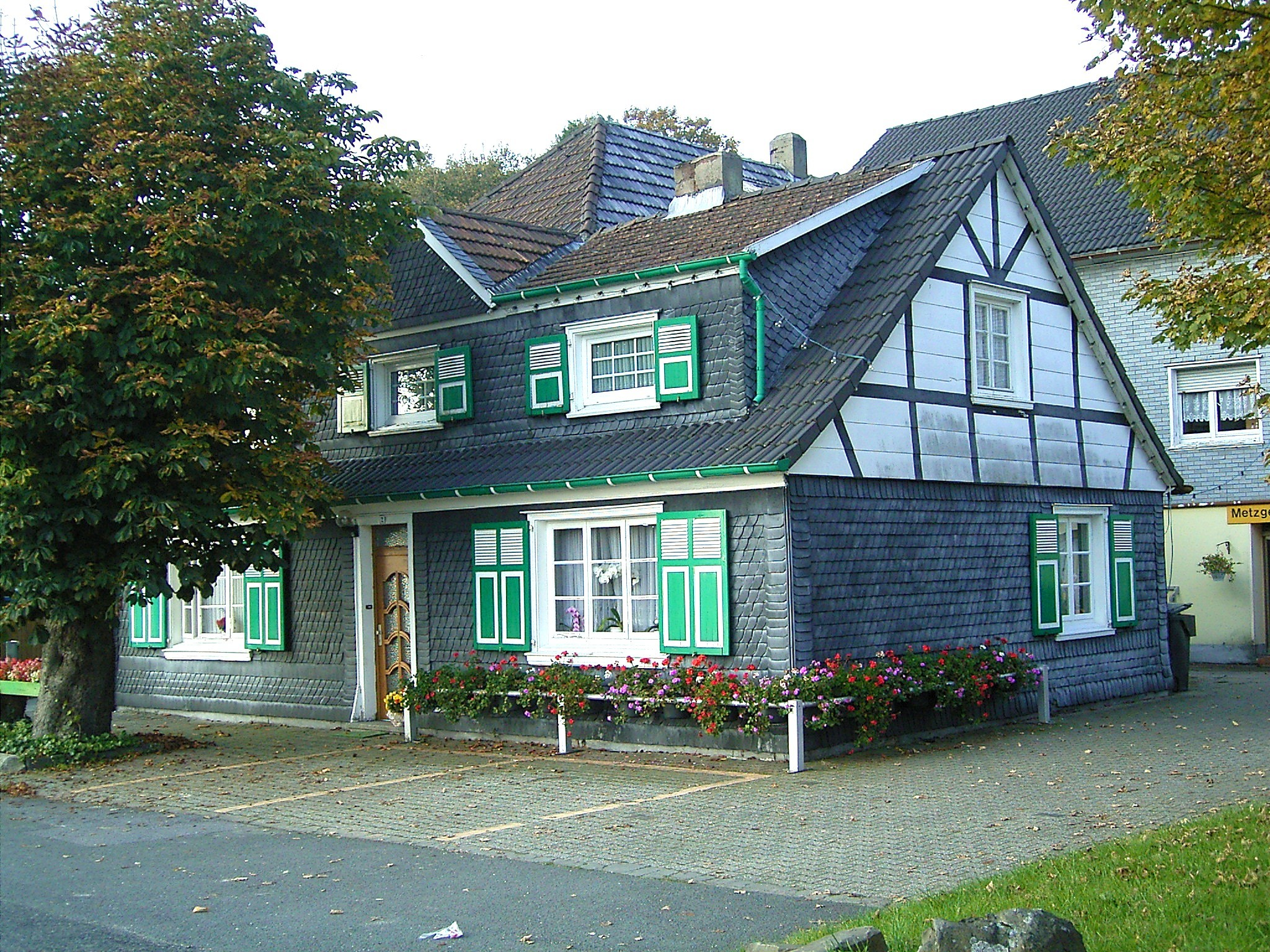 Radevormwald